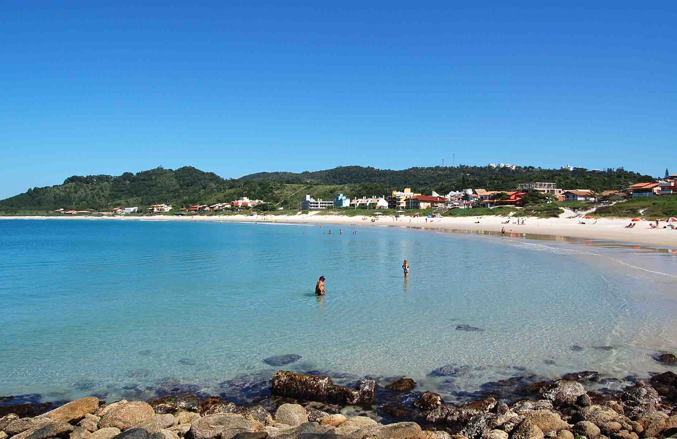 Praia de Quatro Ilhas